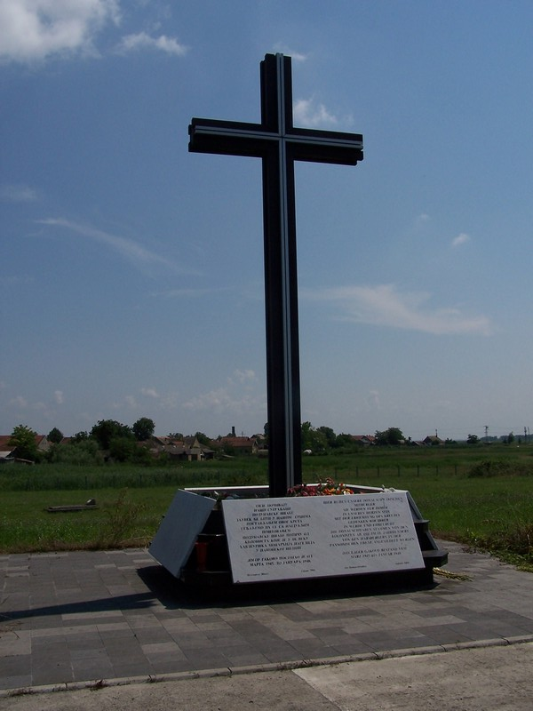 Gakovo. Gedenkkreuz